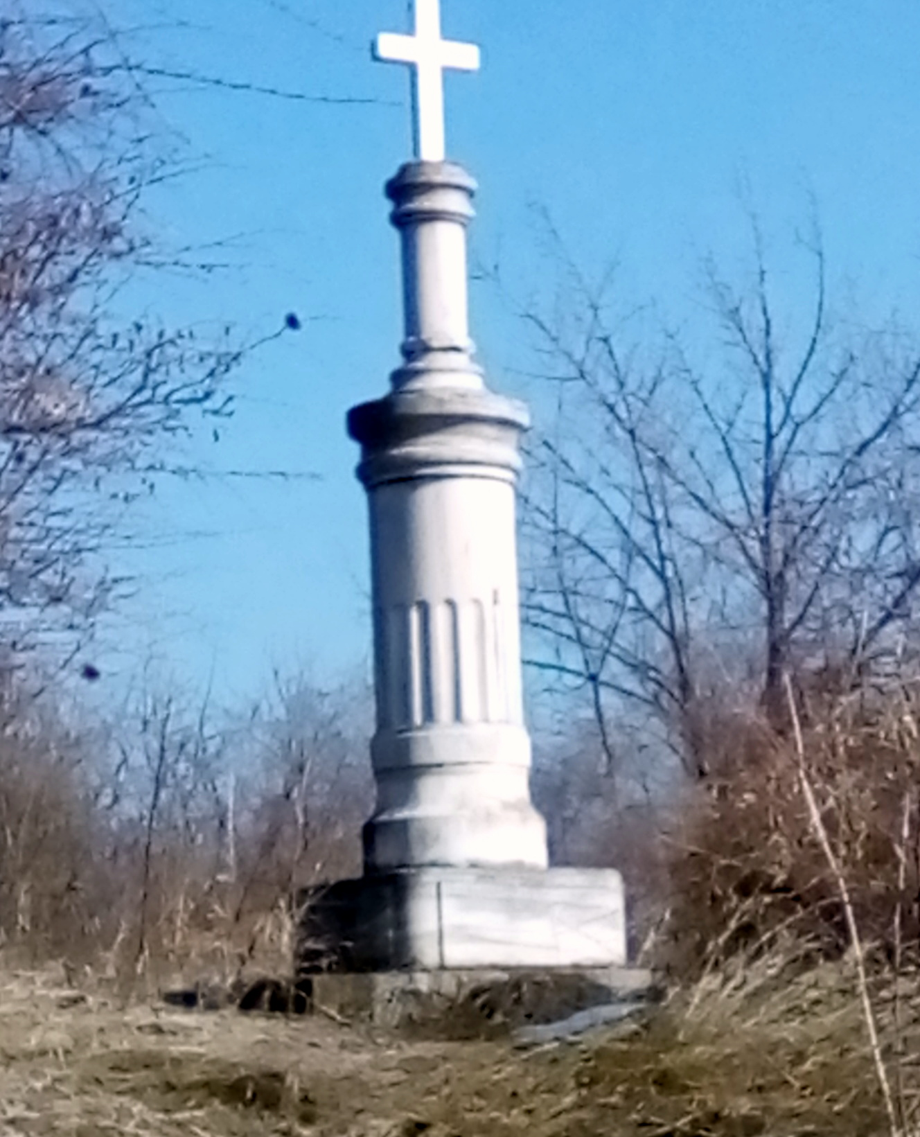 Паметник на офицерите от 117 Ярославски и 118 Шуйски полк, убити при втората атака на Плевен на 18 юли 1877 г.